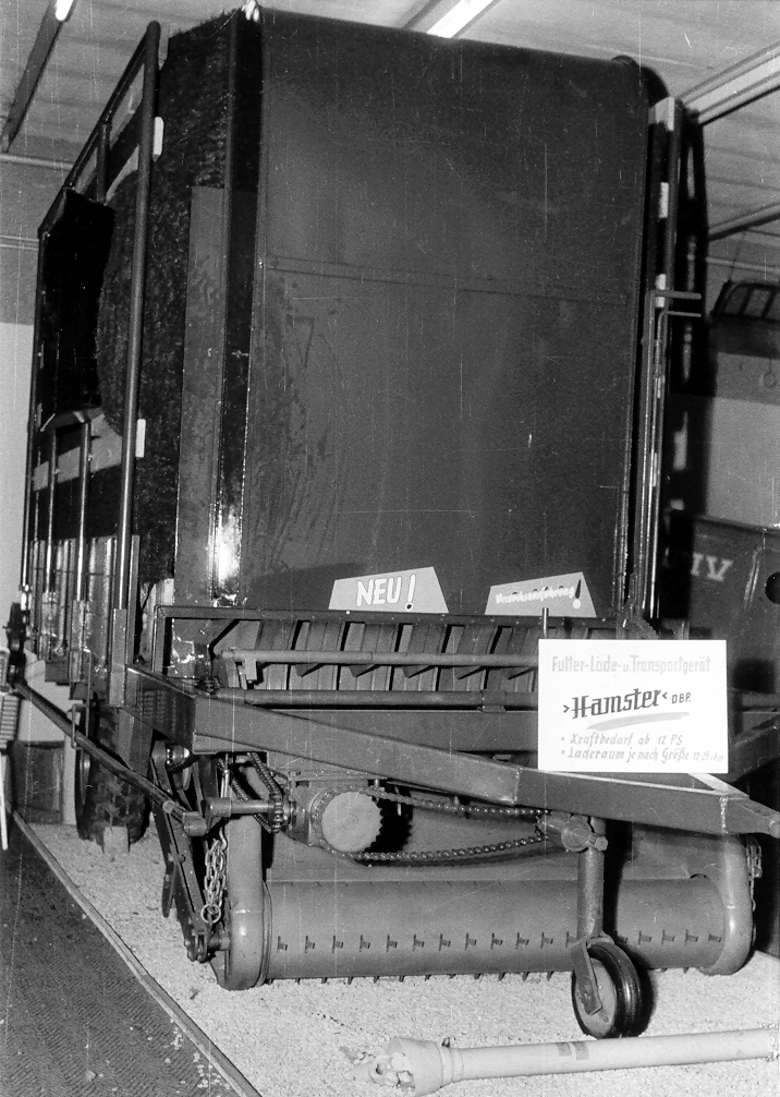 Prototyp des Futter-Lade- und Transportgerätes „Hamster“ (Ladewagen) von Ernst Weichel auf der Ausstellung der Deutschen Landwirtschaftsgesellschaft (DLG) ab 15. Mai 1960 in Köln